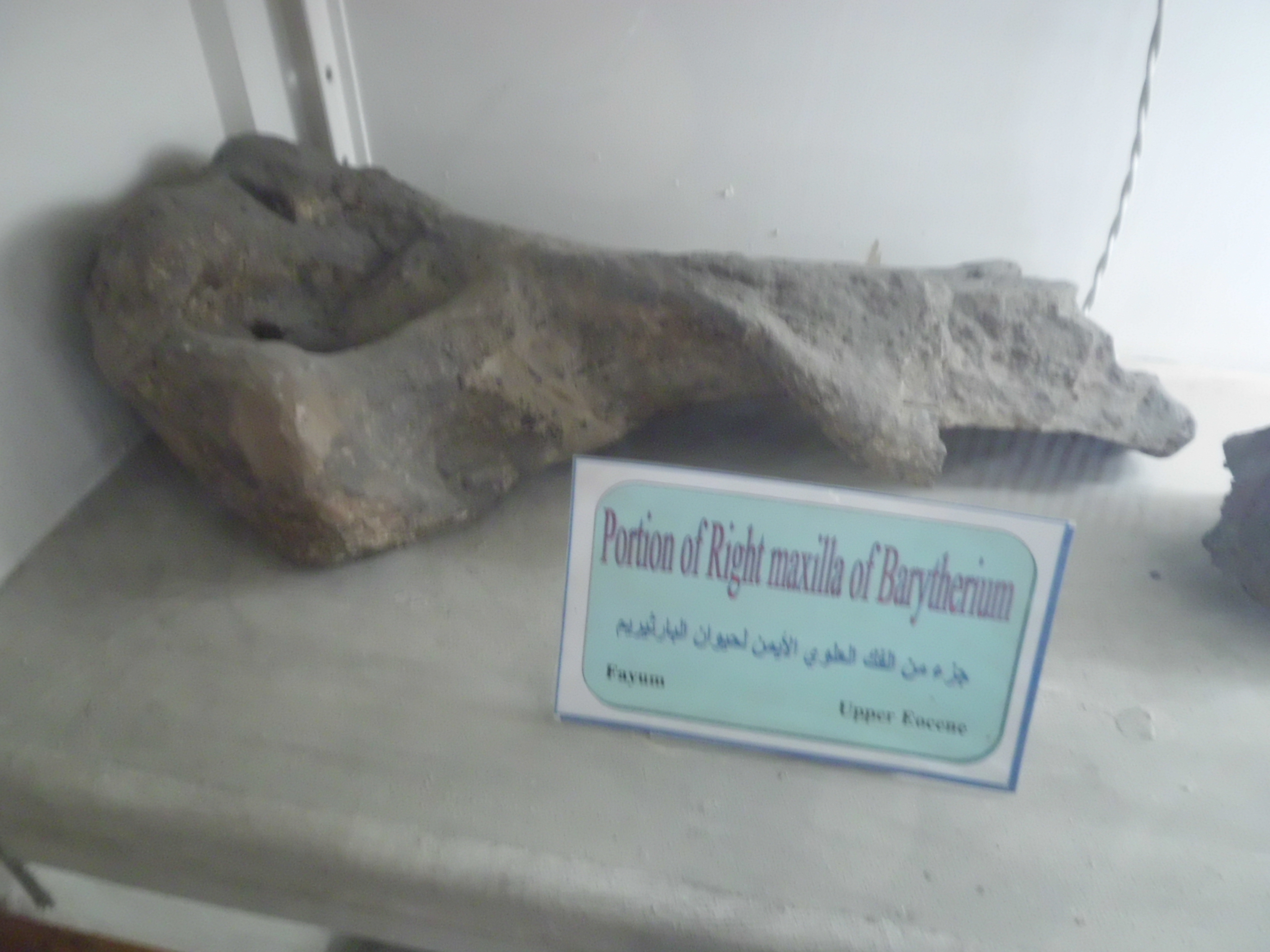 جزء من الفك العلوي الأيمن لحيوان بارثيريم